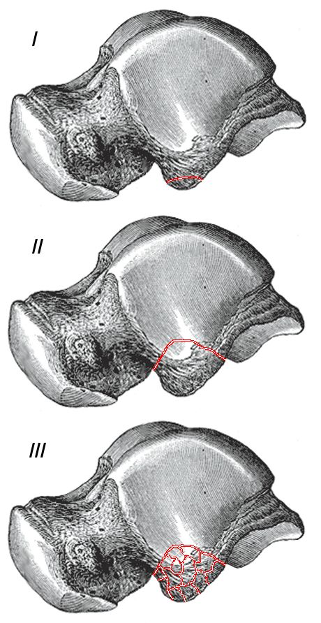 From Gray's Anatomy. Abgewandelt. Abgebildet ist das Sprungbein / der Talus in der Ansicht von aussen (lateral). Die Typen der Fraktur des Processus lateralis tali von I bis III nach McCrory sind abgebildet. Siehe Snowboarder's ankle.